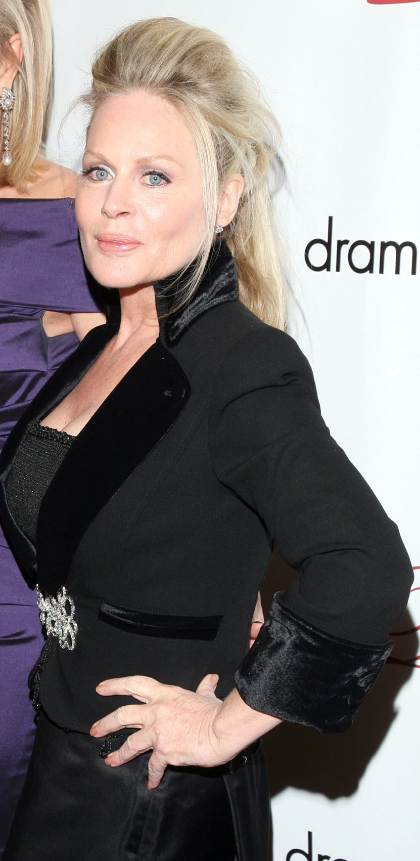 BD Wong, Barbera Steele, Beverly D'Angelo